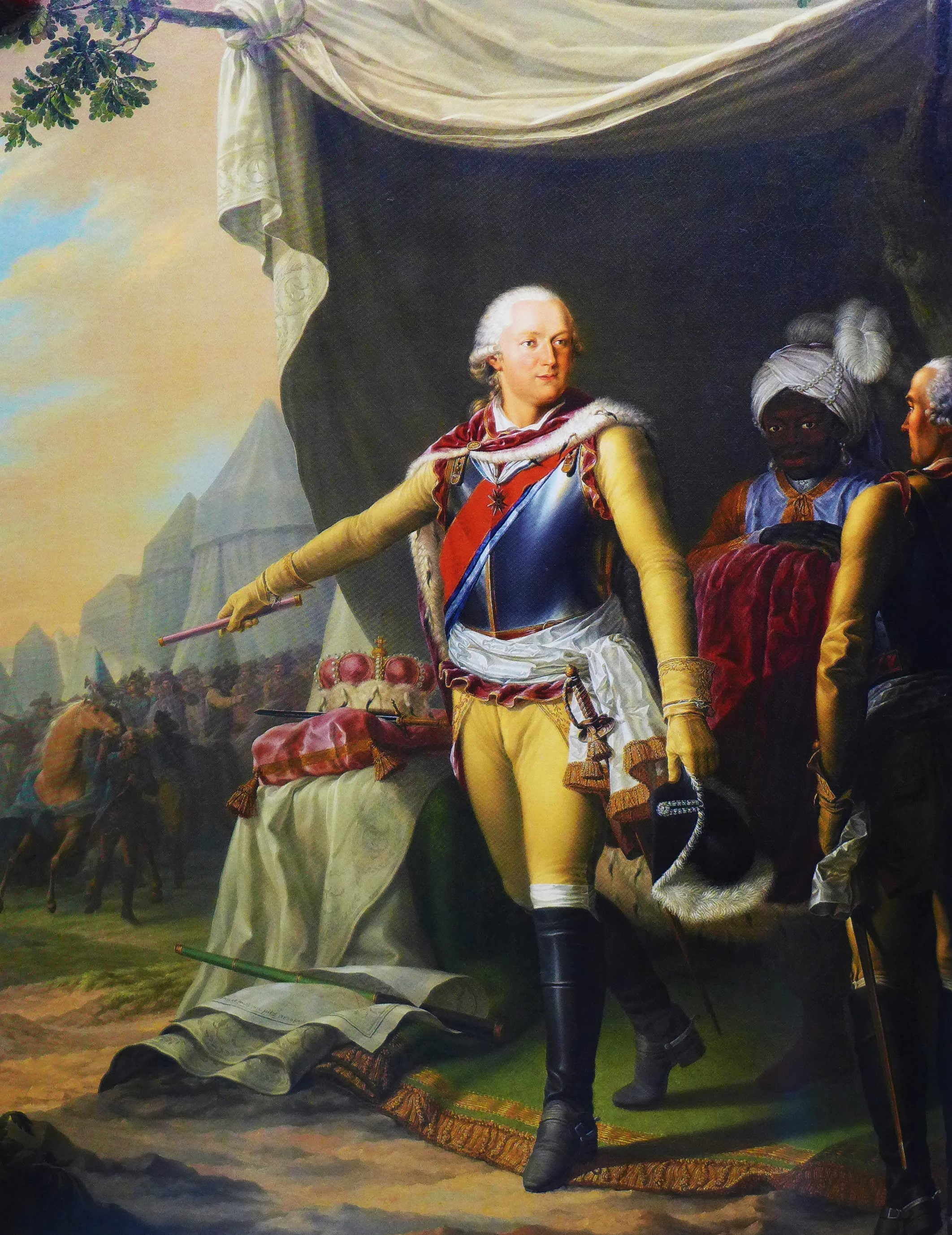 Karl II. August als Generalissimus bei der Rückkehr seines Régiments Royal-Deux-Ponts aus dem amerikanischen Unabhängigkeitskrieg, Gemälde von Johann Kaspar Pitz (1756-1795), Öl auf Leinwand, Paris 1733, Münchener Residenz, Inventarnummer ResMü 296, Repro-Ausschnitt